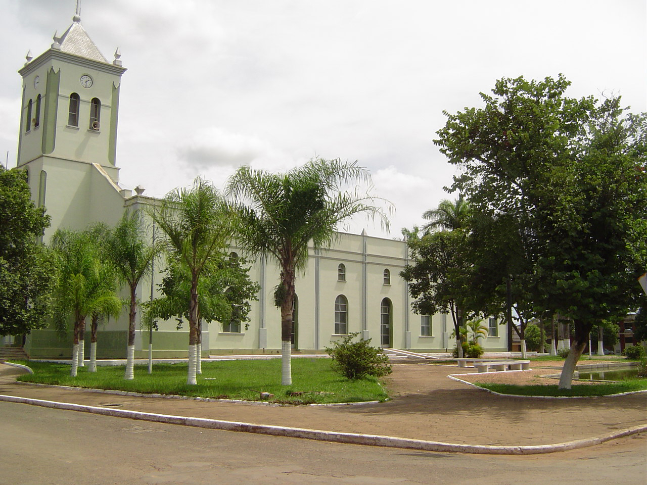 Igreja Matriz do Município de Abaeté, MG., Brasil. Foto feita por: Otávio Morato de Andrade.